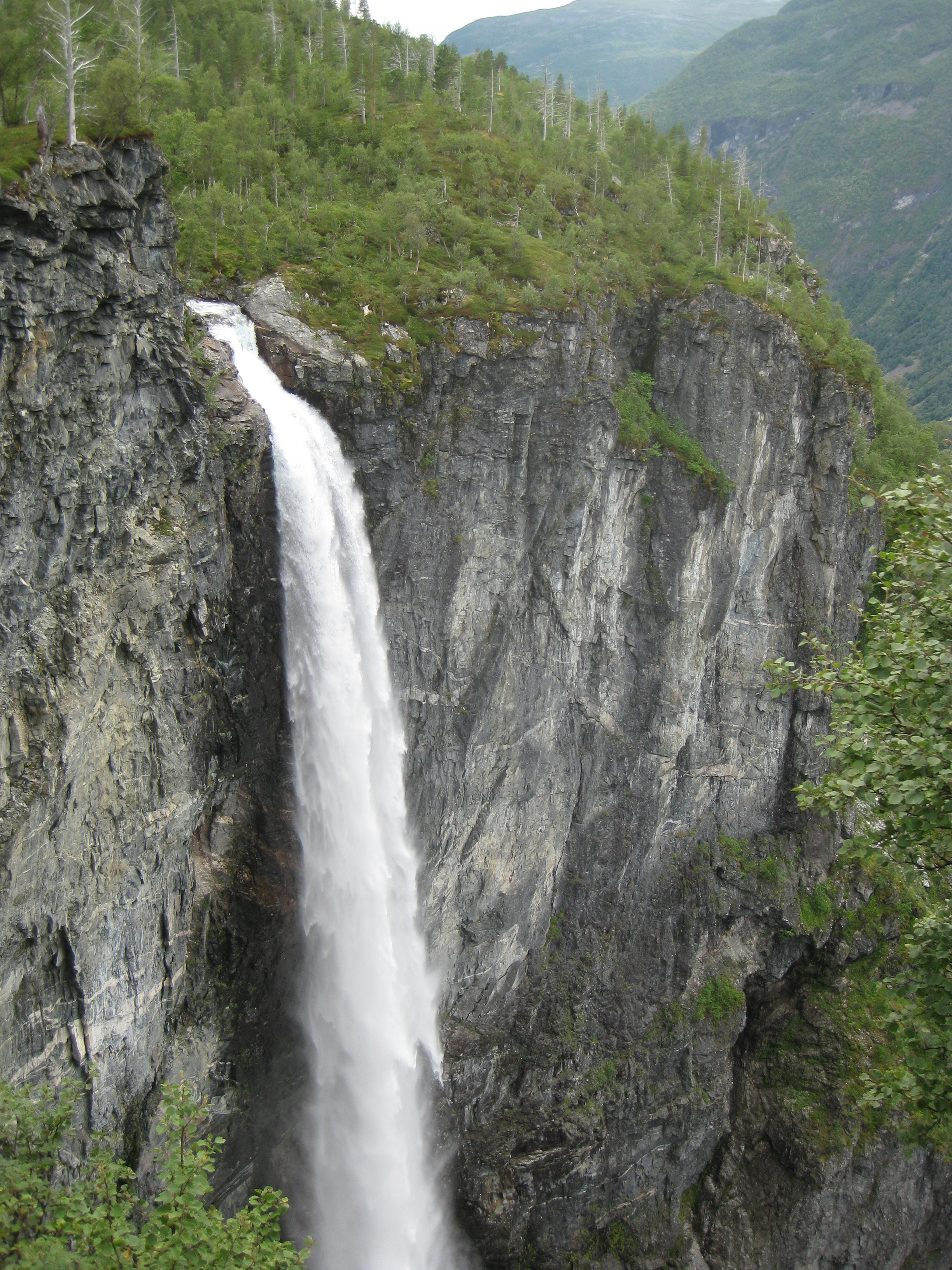 Blick auf den Vettisfossen